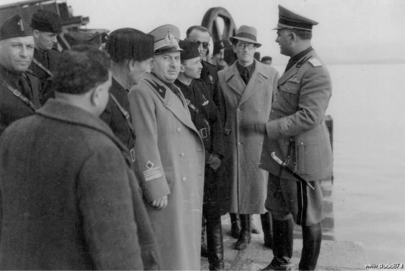 De Pompeis e Cobolli Gigli. Il 28 novembre 1938, in prossimità della cerimonia inaugurale di Carbonia, il Ministro del Lavoro Giuseppe Cobogli Gigli verifica i lavori al porto.